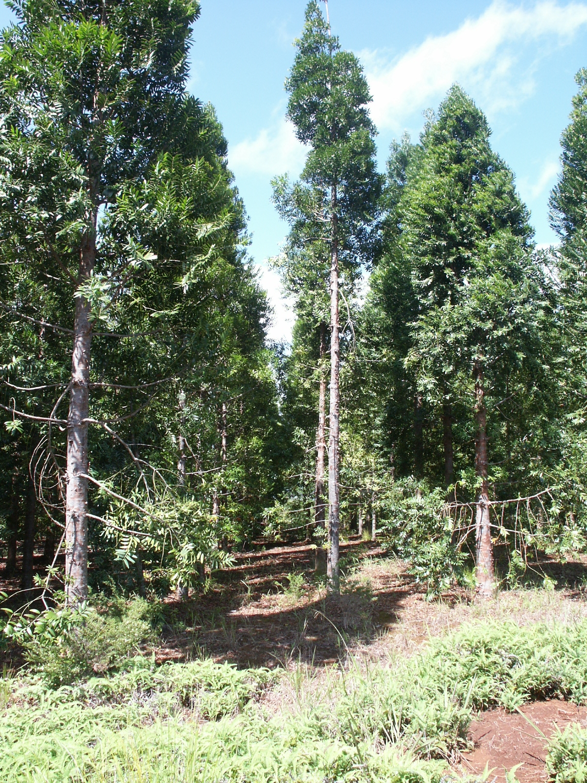 Plantation d'Agathis lanceolata (kaori) dans la région des lacs. Les arbres ont environ 35 ans. Nouvelle-Calédonie.